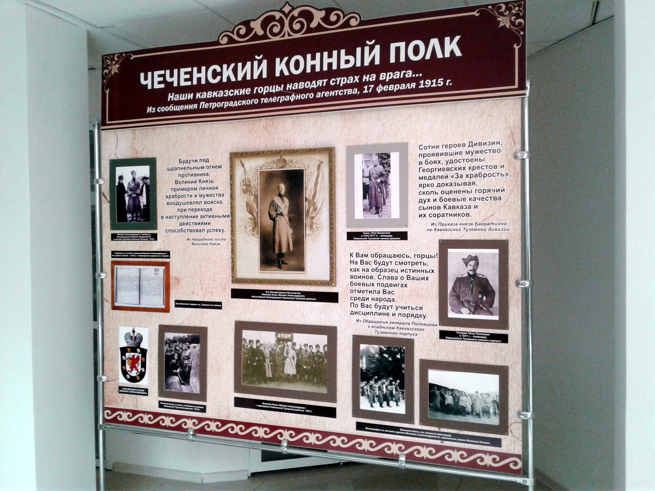 Стенд выставки в Национальной библиотеке Чечни, посвященной Чеченскому конному полку Дикой дивизии